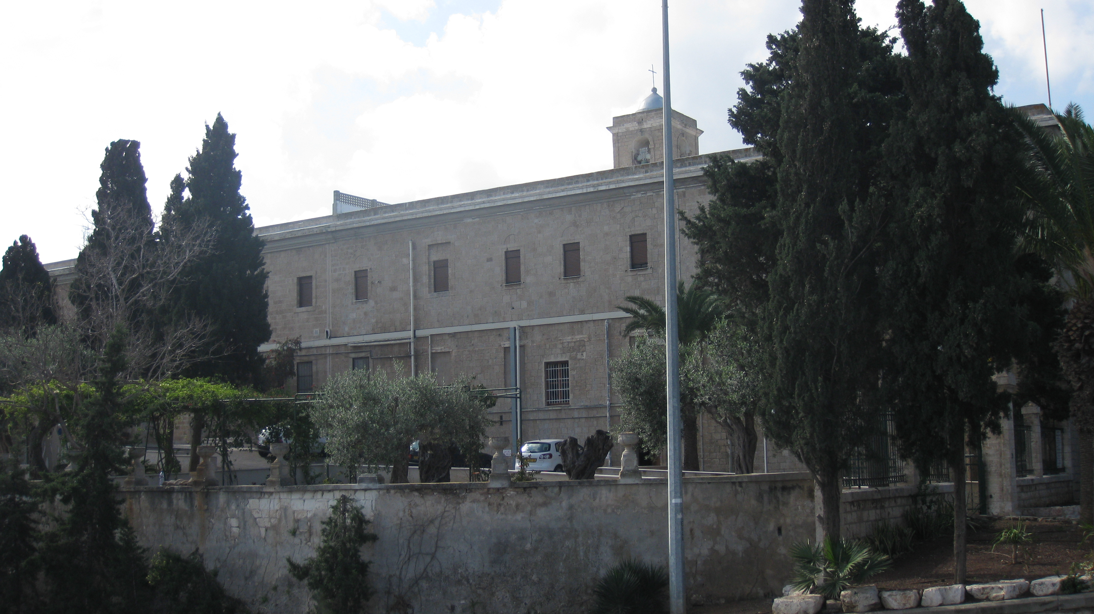 Stella Maris Monastery חזית מנזר סטלה מאריס